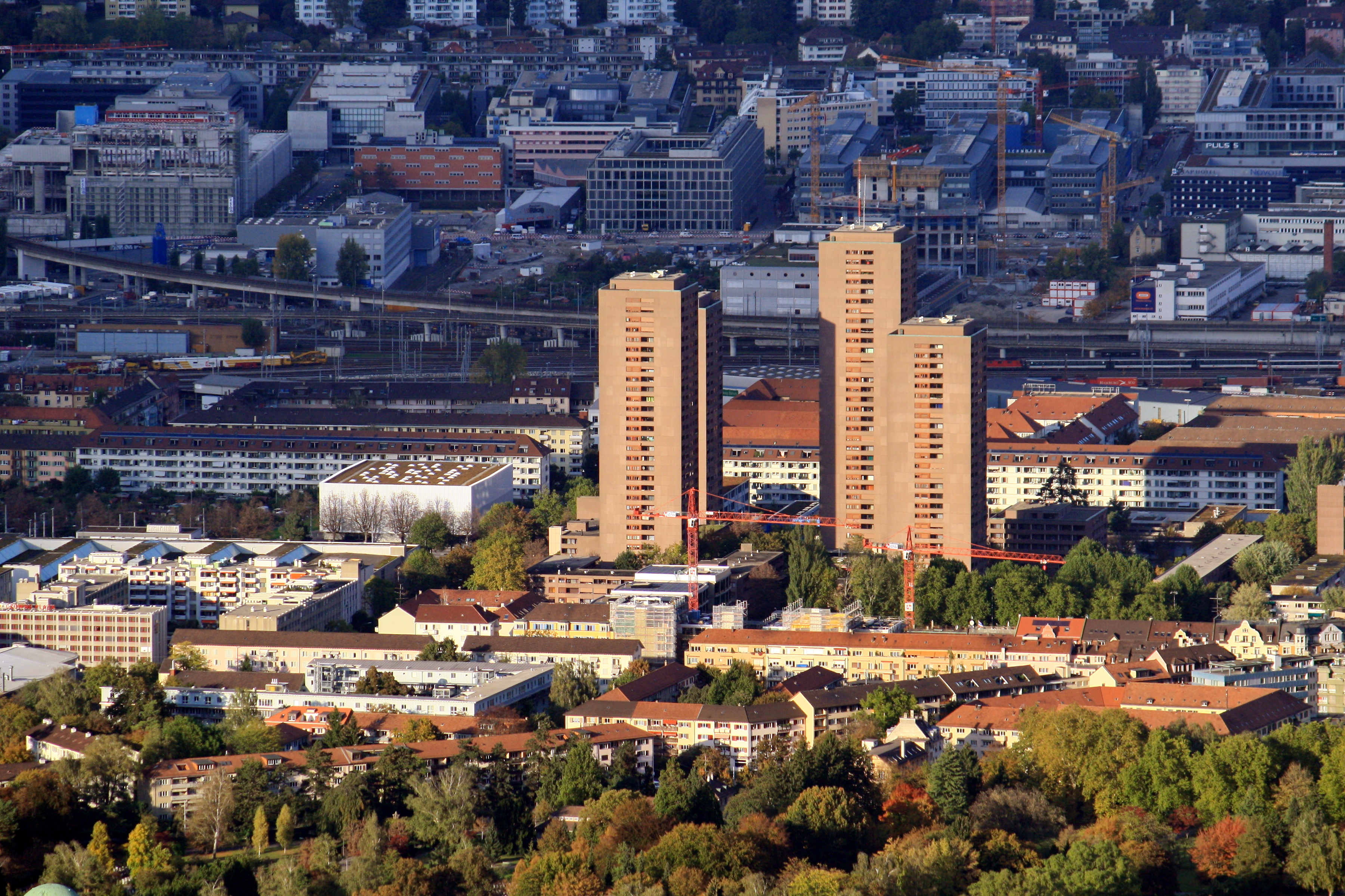 Zürich-Hard and Industrie quarters, as seen from Uetliberg Aussichtsturm